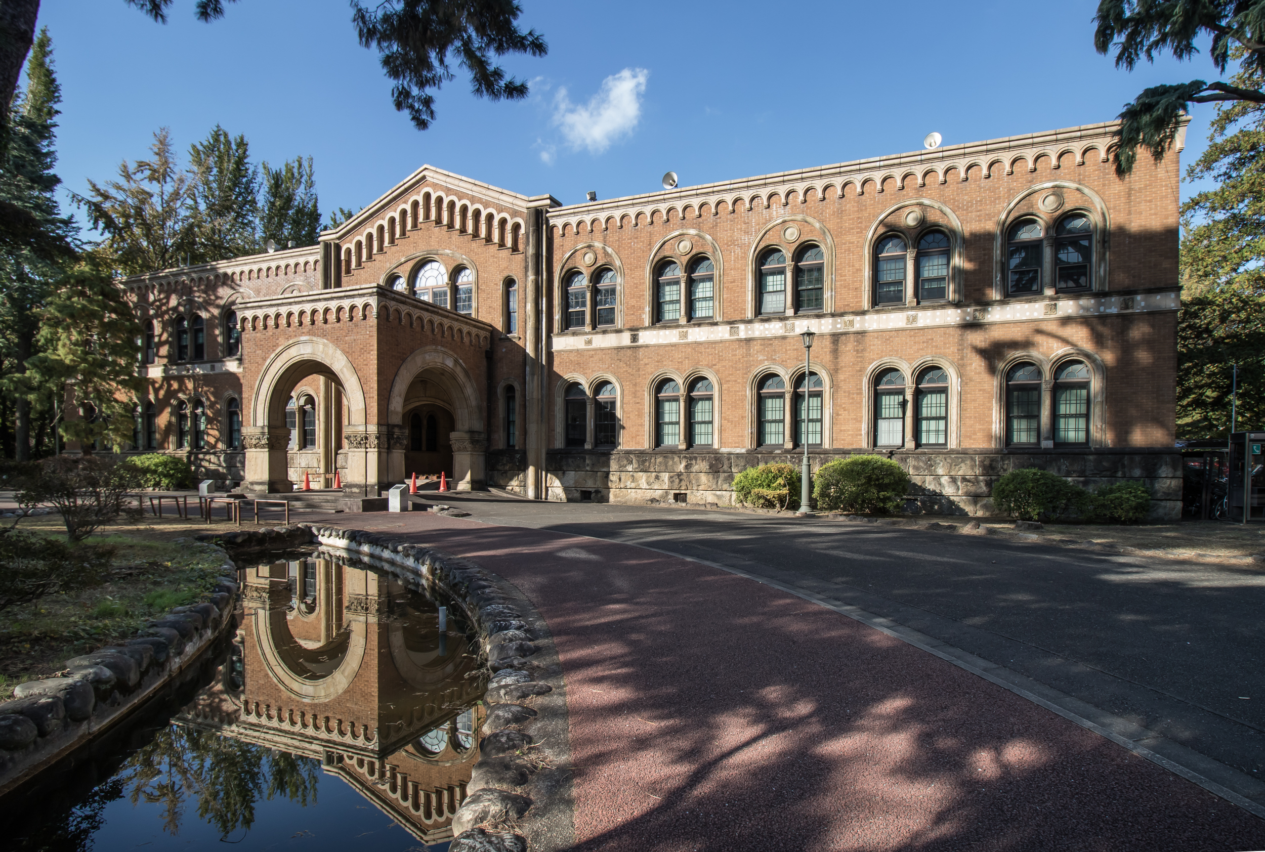 一橋大学 国立キャンパス東本館（旧東京商科大学商学専門部）。登録有形文化財。